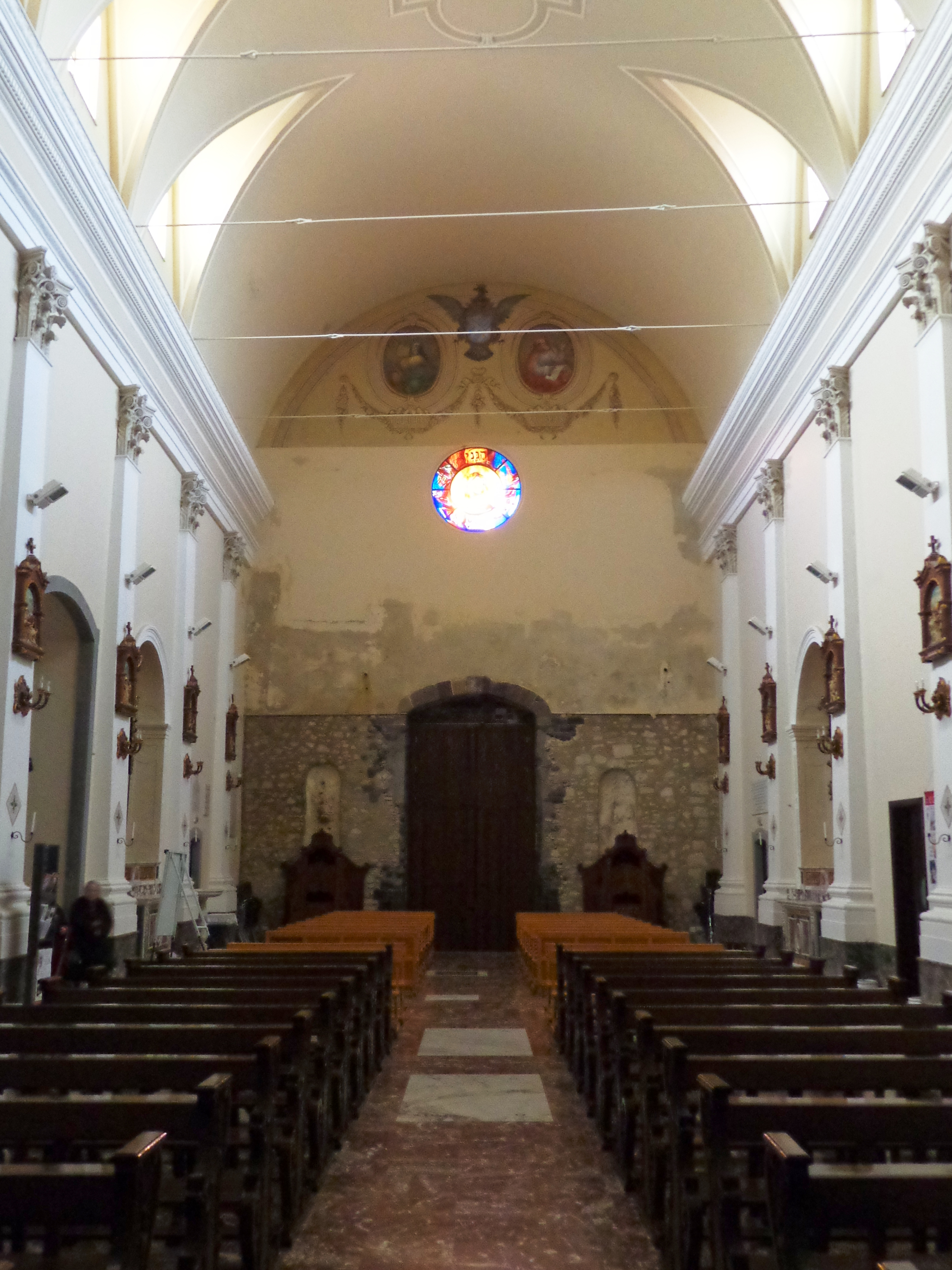 Cattedrale Patti 18